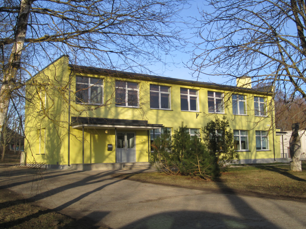 Vaade Kadrina valla raamatukogule Viru tänavalt